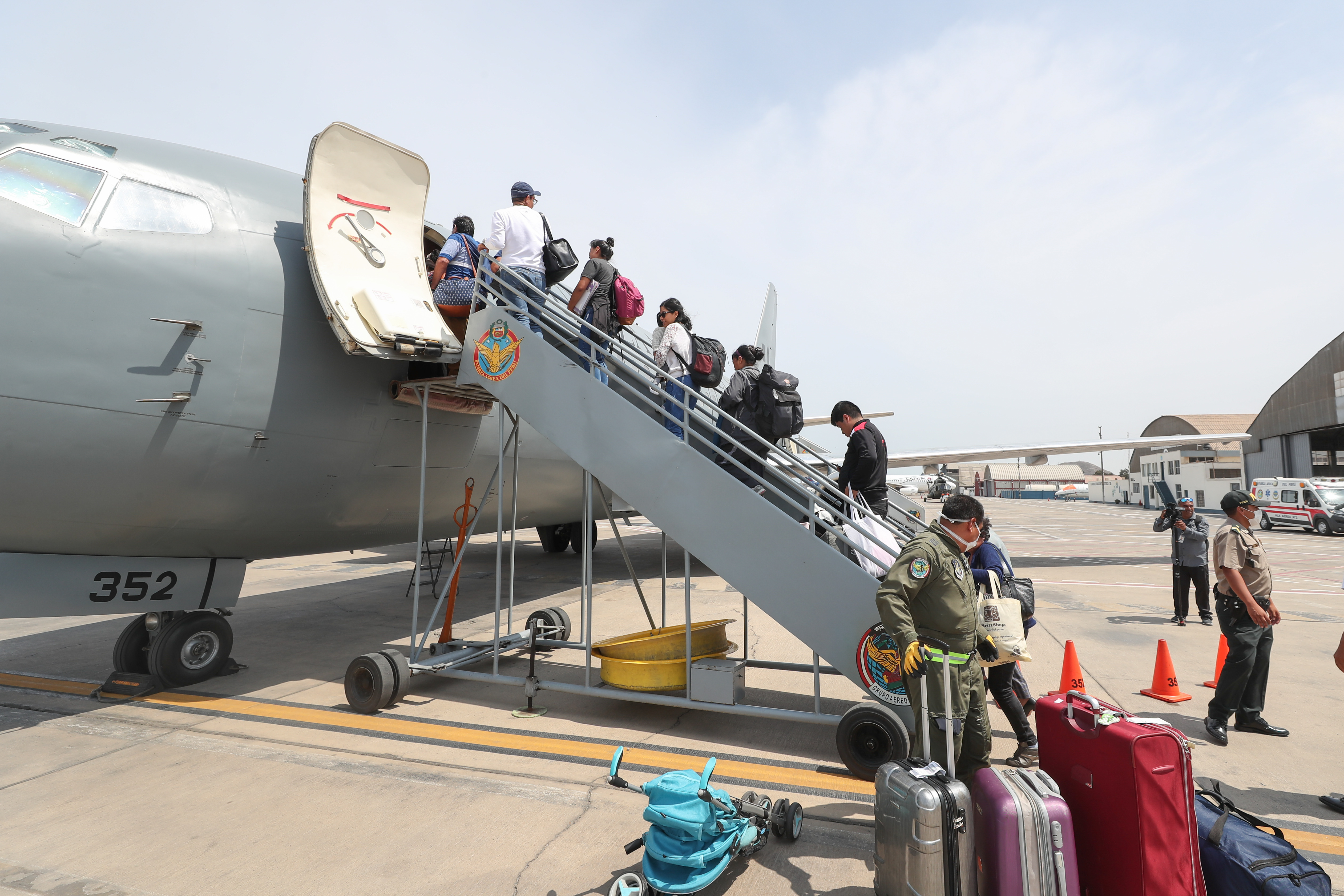 Vuelos humanitarios al interior del país por parte de la Fuerza Aérea del Perú